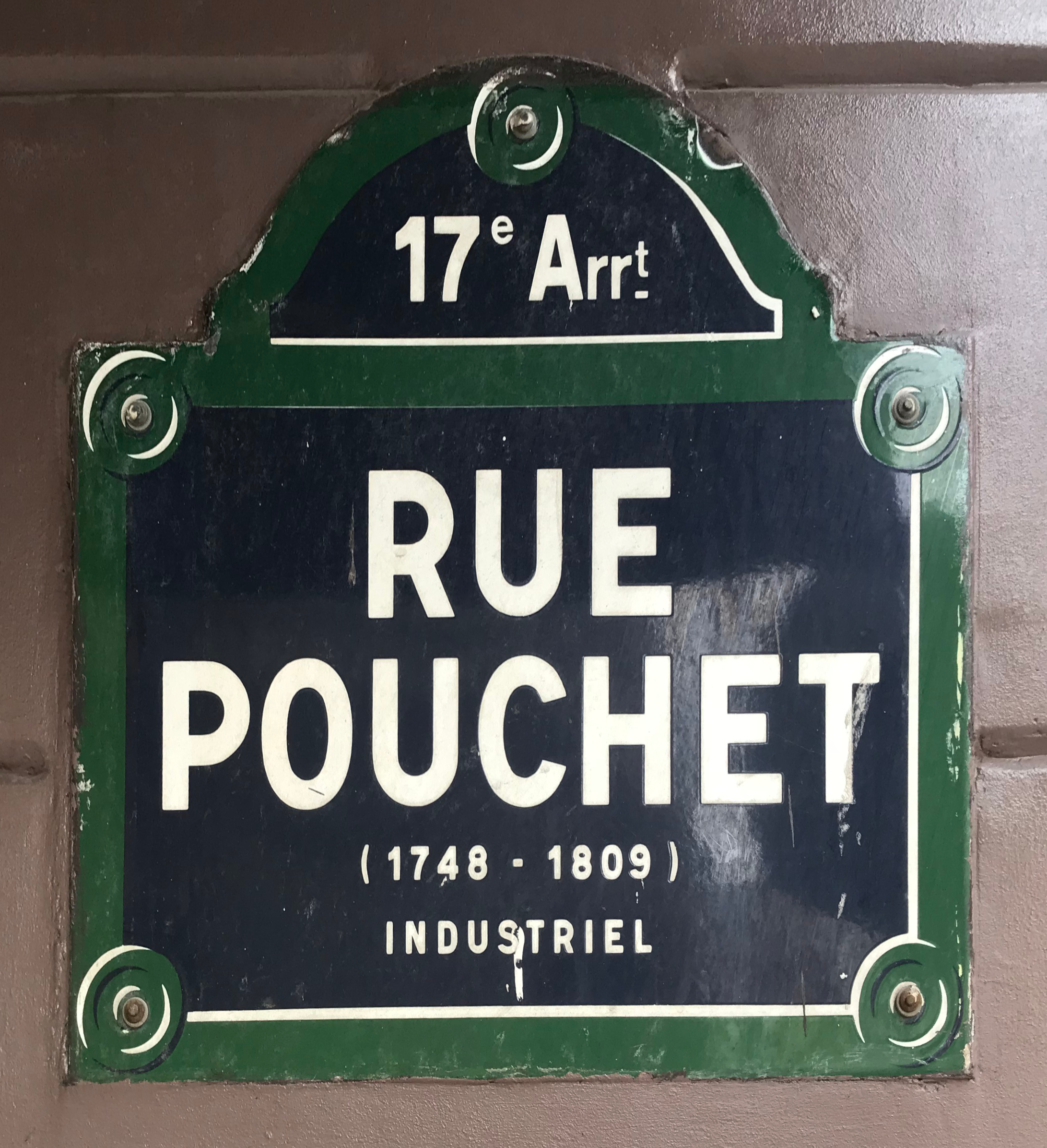 Image de Paris, septembre 2018.